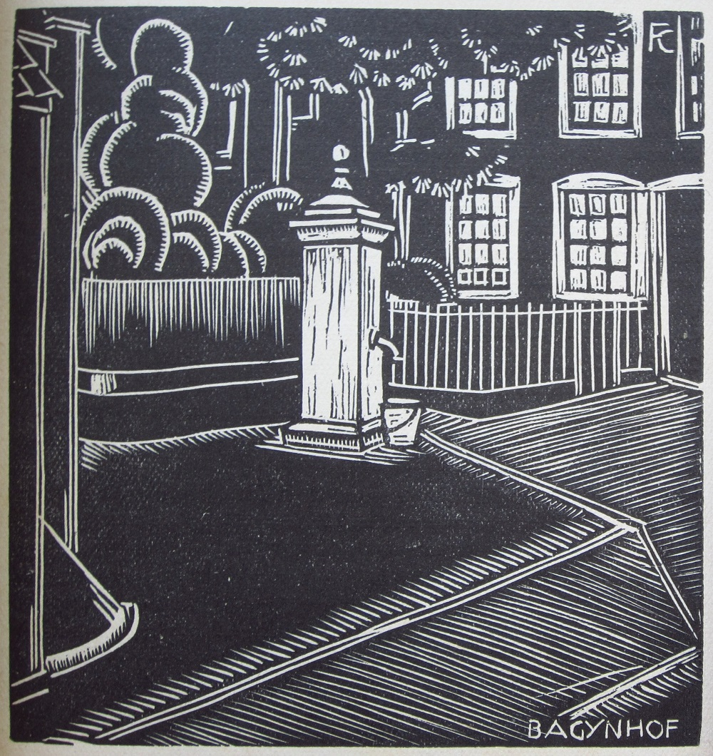 Fré Cohen (1903-1943), illustratie uit Hoogty (1926) — 'Bagynhof'